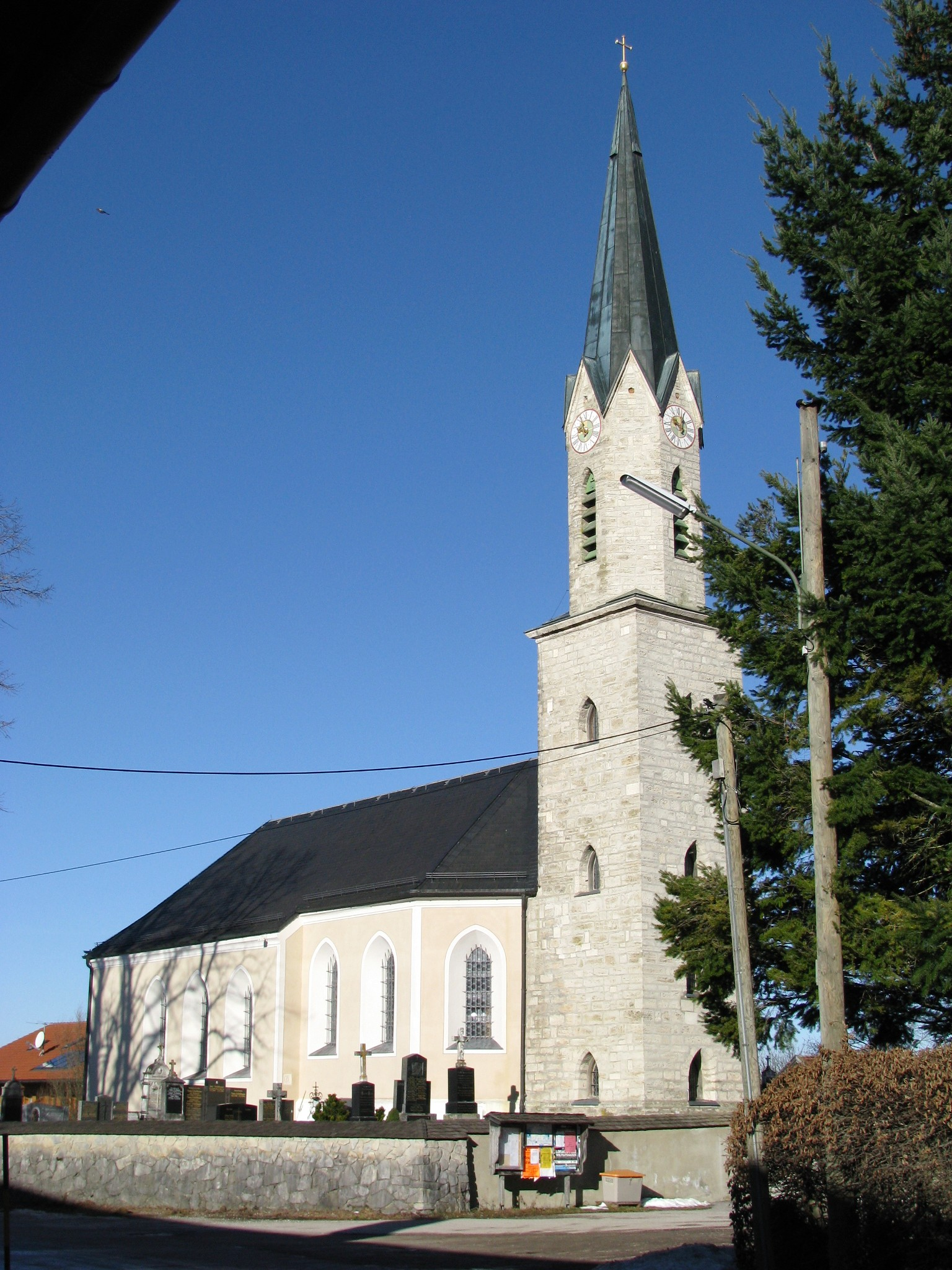 Kath. Filialkirche St. Georg in Feldkirchen, Gemeinde Egling in Oberbayern; spätgotisch, Ostturm Mitte 19. Jh.